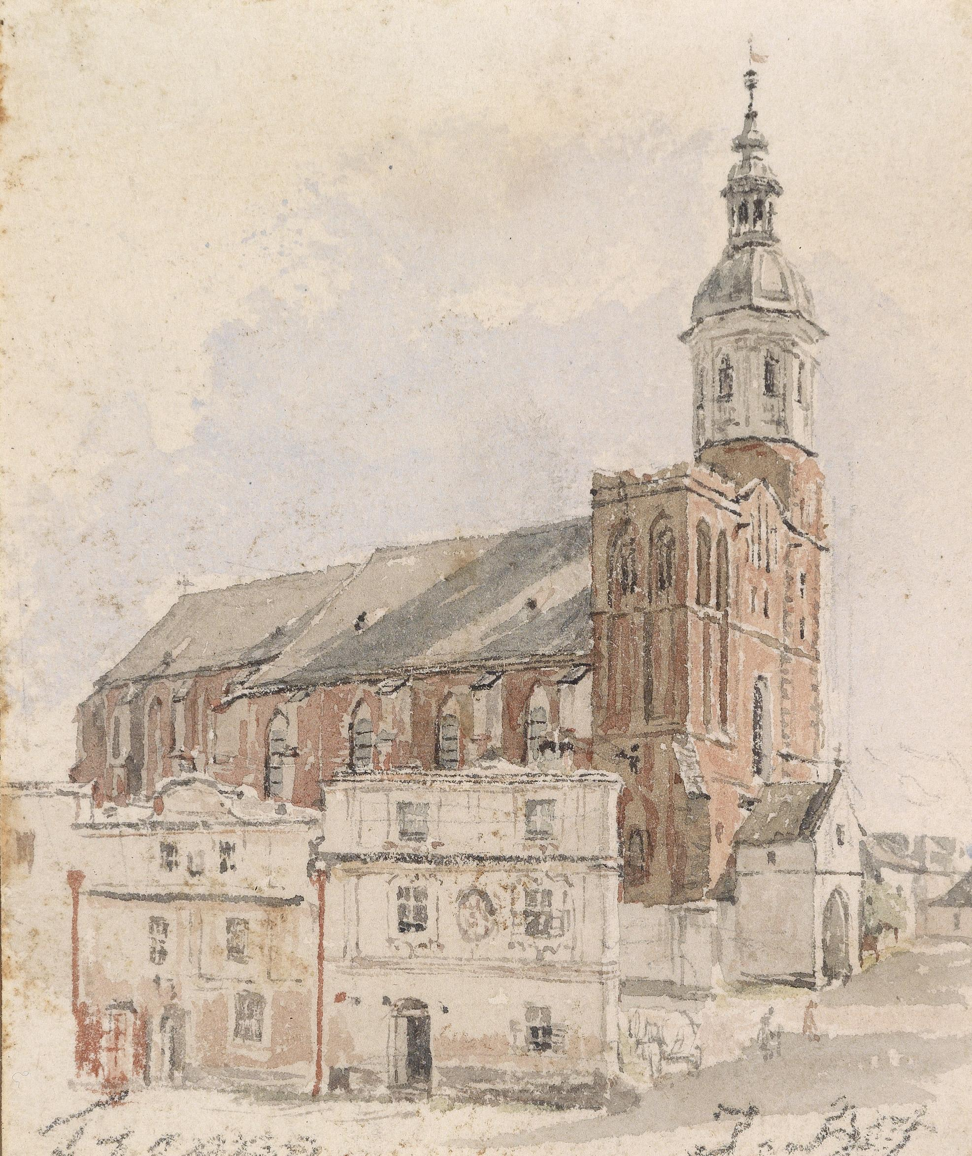 Die Pfarrkirche in Troppau